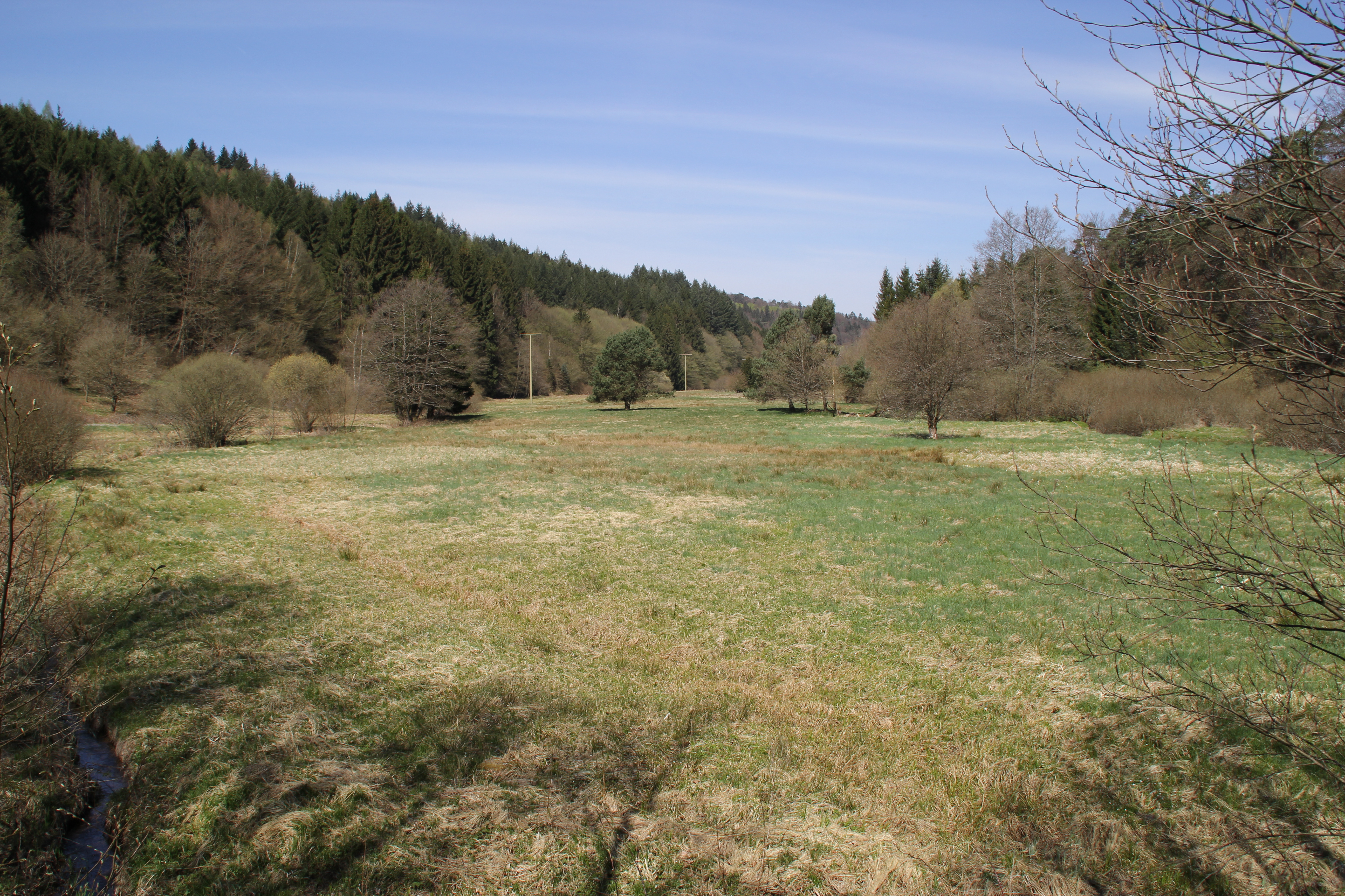 Das Naturschutzgebiet Spessartwiesen nördlich von Wiesthal, Bayern